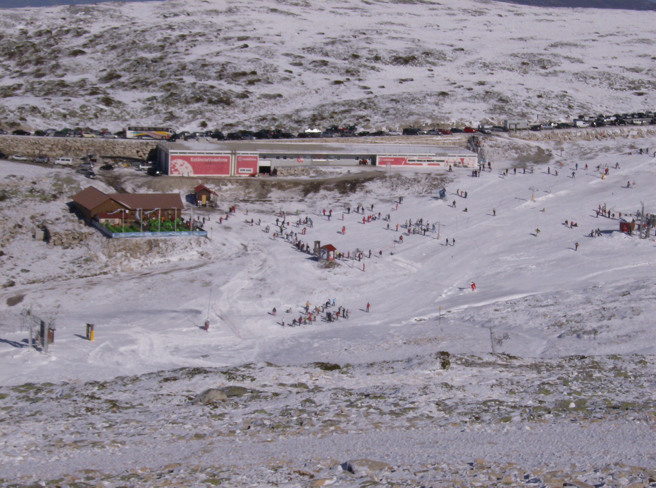 Vodafone Ski Resort - Serra da Estrela/Portugal